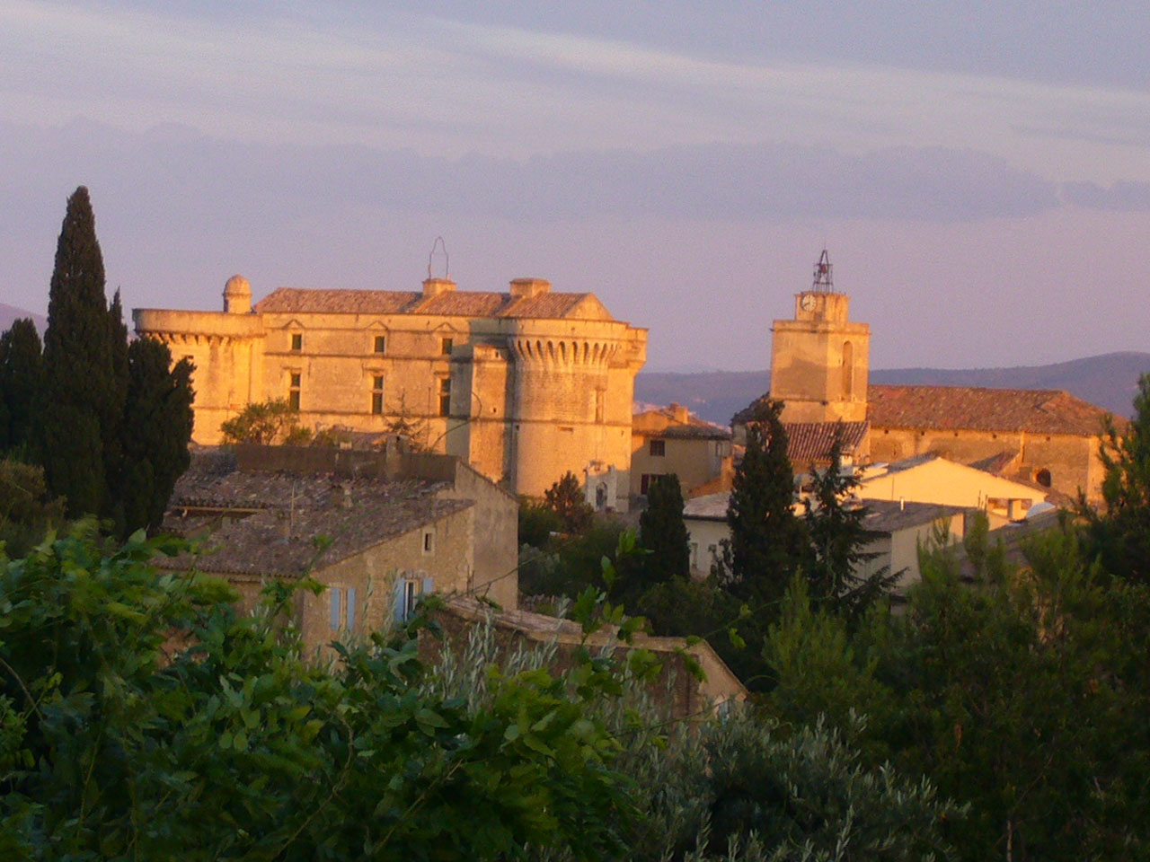 Château et église de Gordes depuis la route de Sénanque